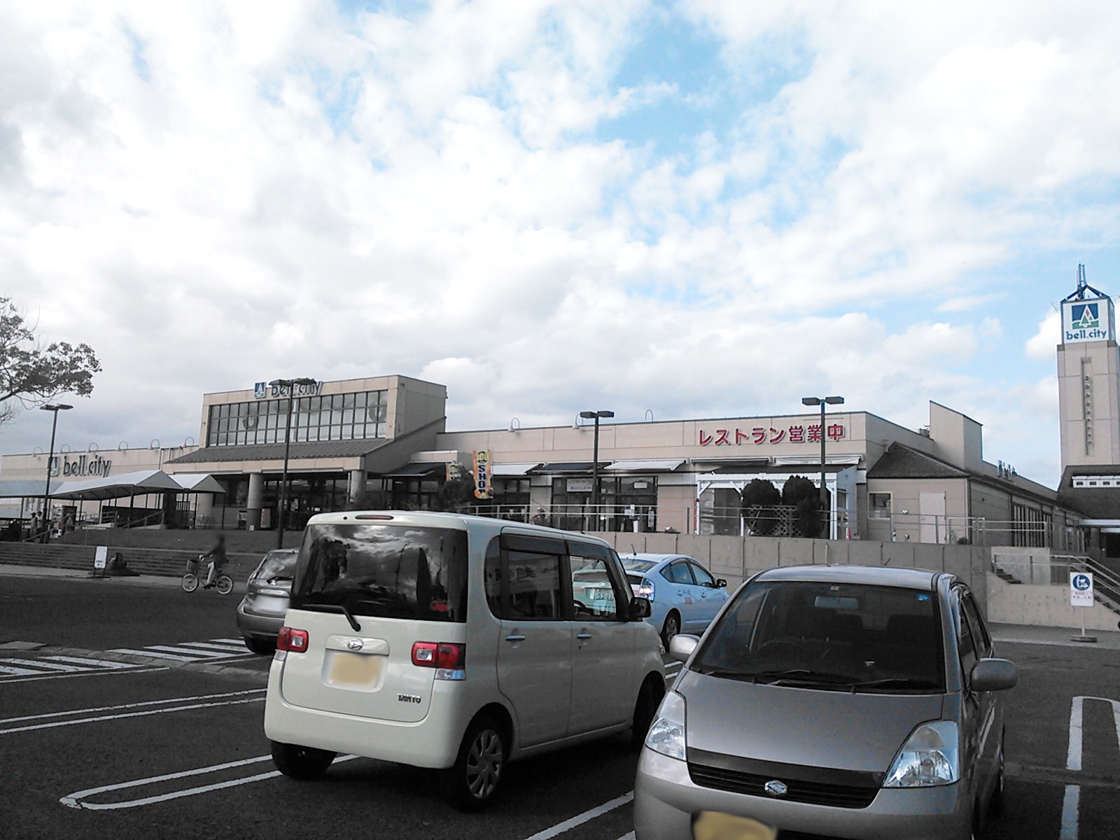 三木町ベルシティ、東正面口。投稿者本人による撮影。